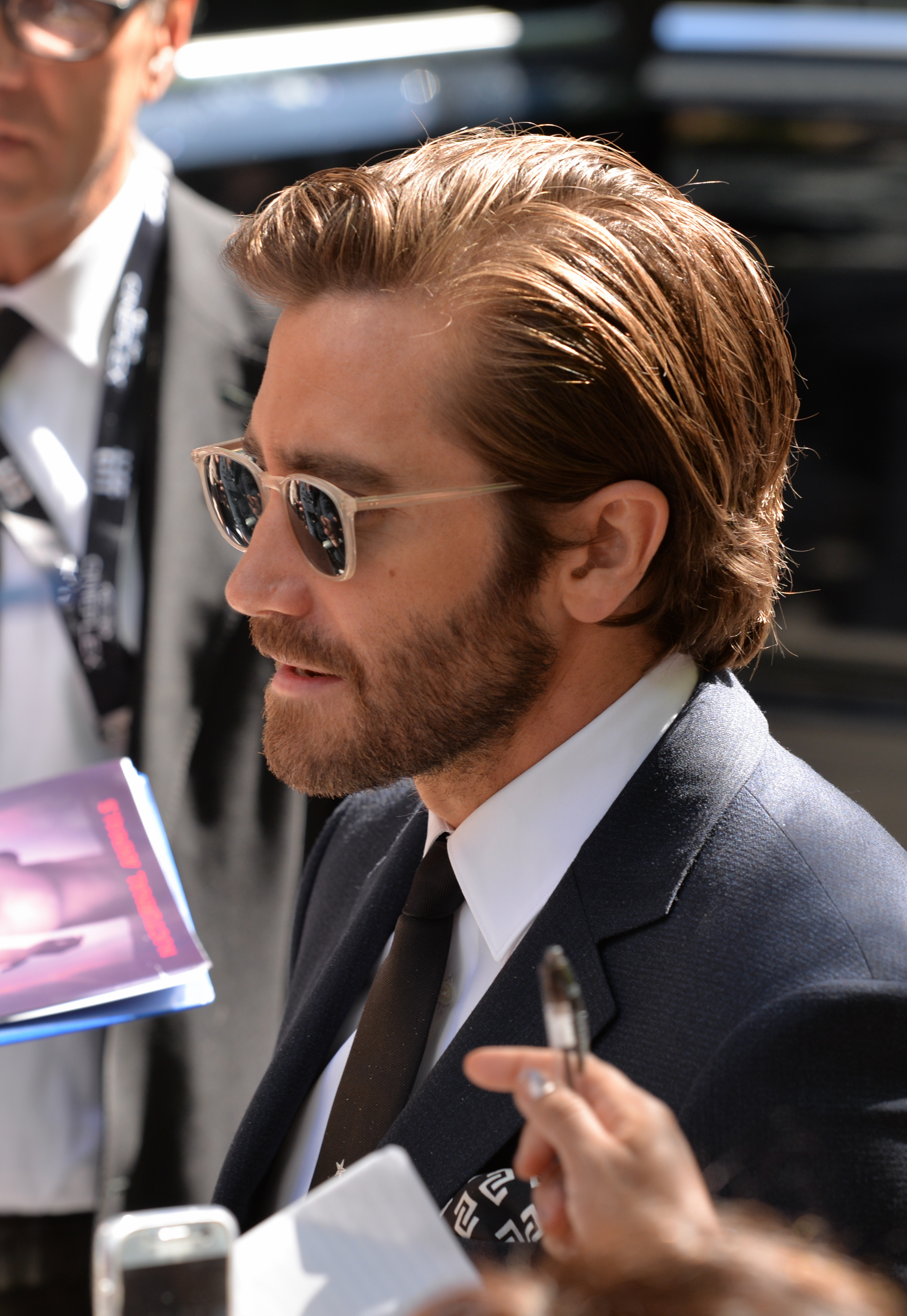 TIFF 2017 Jake Gyllenhaal